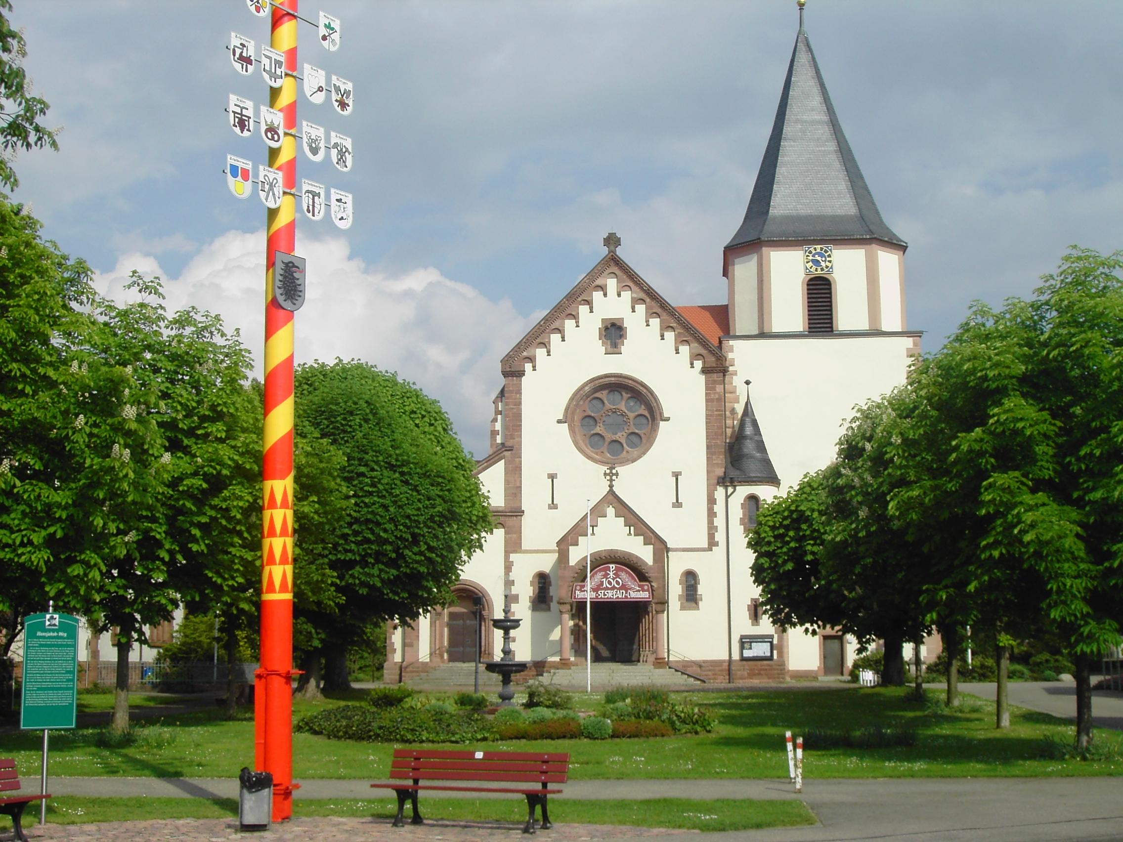 Neuromanische Pfarrkirche "St. Stefan" in Oberachern, Stadt Achern, erbaut 1905. Der untere Teil des Kirchturms stammt aus dem Mittelalter, der Aufsatz aus dem 18. Jahrhundert.